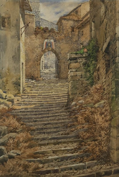 La "porta della valle" ad Affile, acquarello, 55.5 x 38 cm., firmato, coll. privata